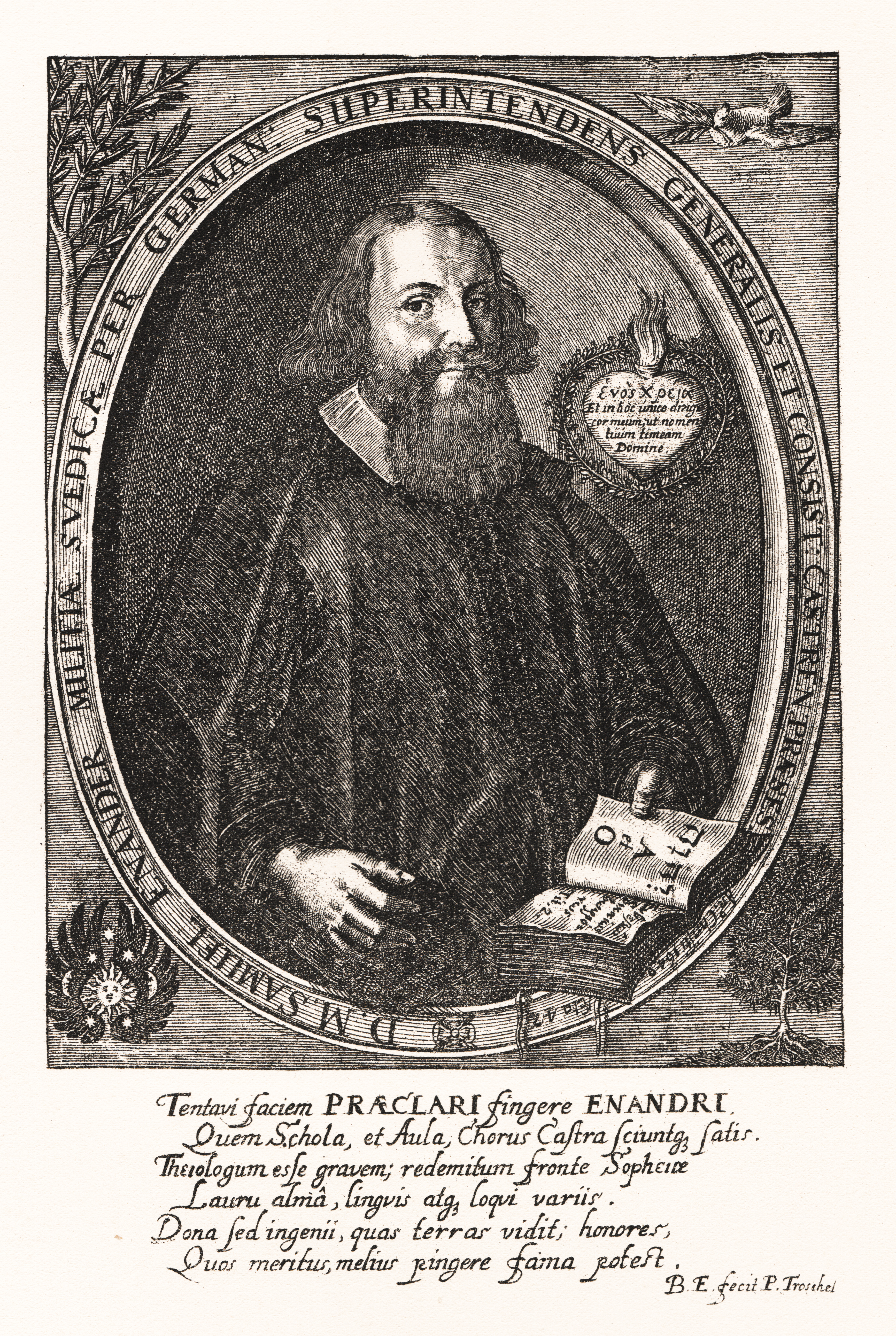 Samuel Enander (1607-1670). Porträttet härrör från en gravyr signerad: B. E. fec. P. Troschel och utförd 1649, då Enander var 42 år gammal. Varianter af detta stick finnas, hvarå synas smärre olikheter i ramverket.